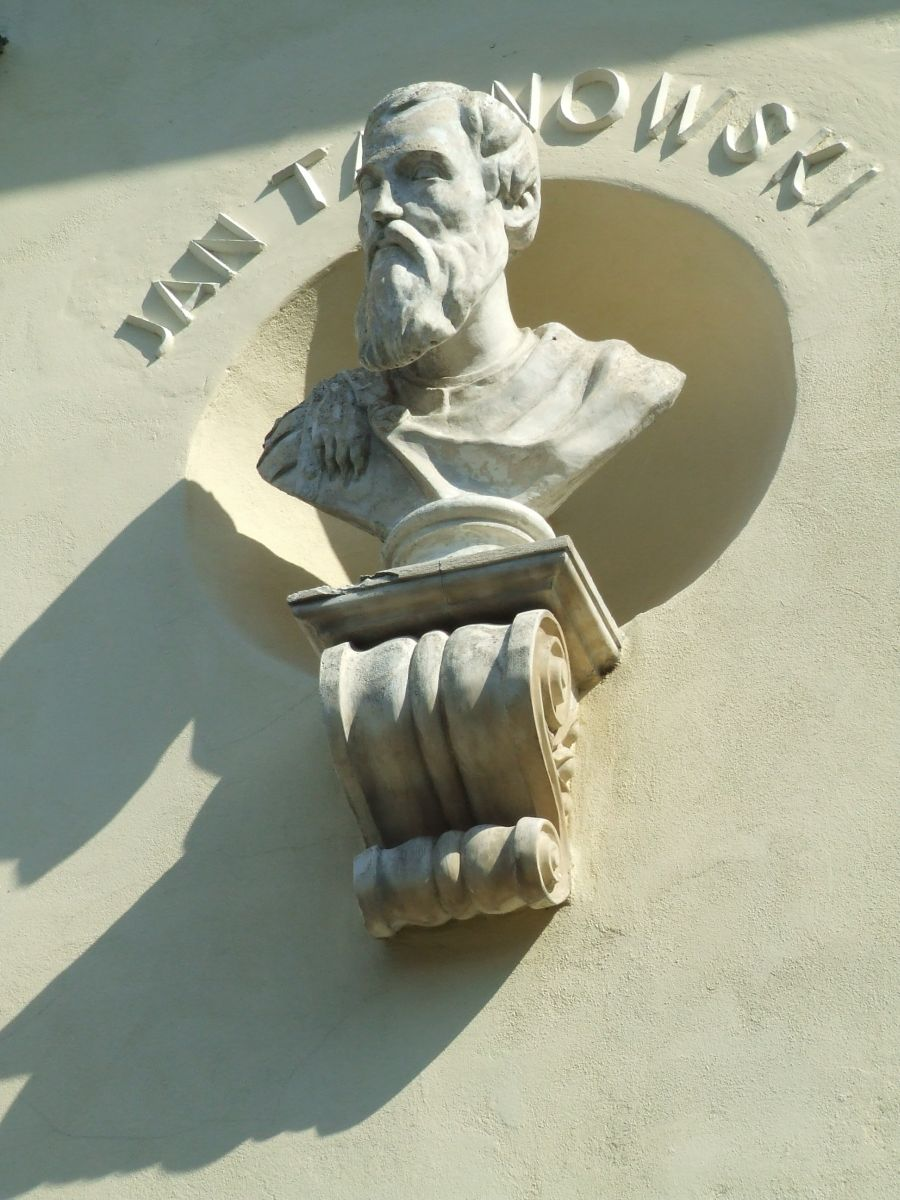 Pałac Juliana Ursyna Niemcewicza, obecnie rektorat SGGW, popiersie Jana Tarnowskiego na elewacji pałacu